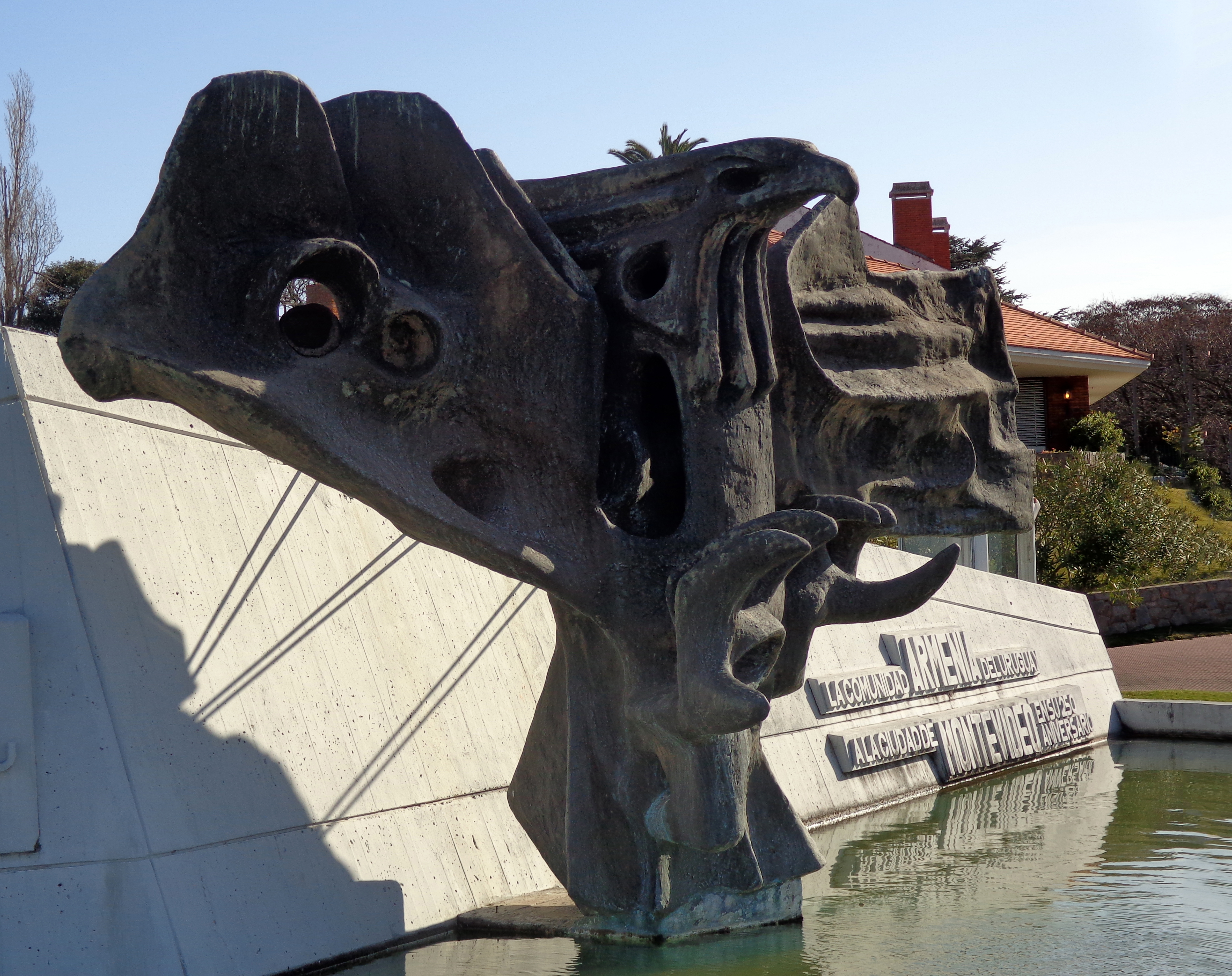 Homenaje de la Colectividad Armenia al Uruguay. Ubicada en el departamento de Montevideo